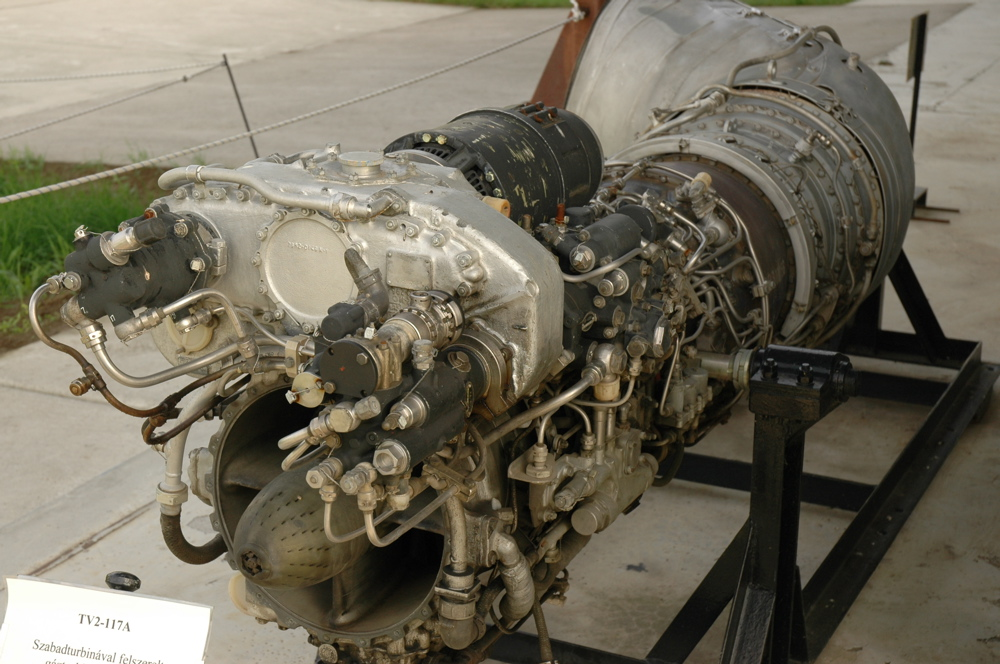 Klimov (Isotov) TV2-117A turboshaft engine